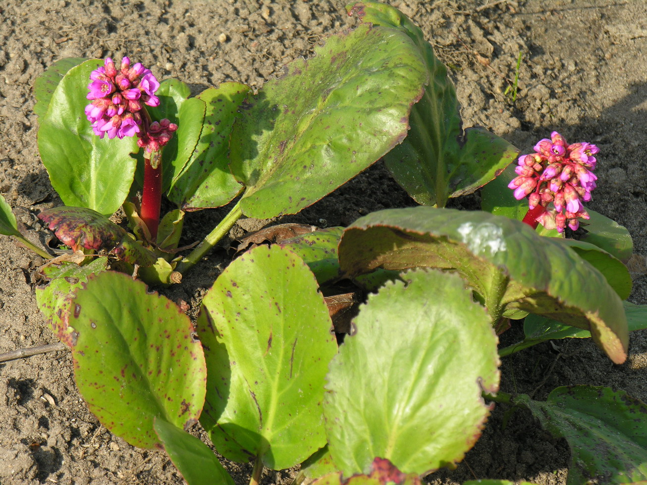 Storalapė bergenija (Bergenia crassifolia) Šeima. Uolaskėliniai (Saxifragaceae) Fotografavo Algirdas, 2006 m. balandžio 29 d., Lietuva.